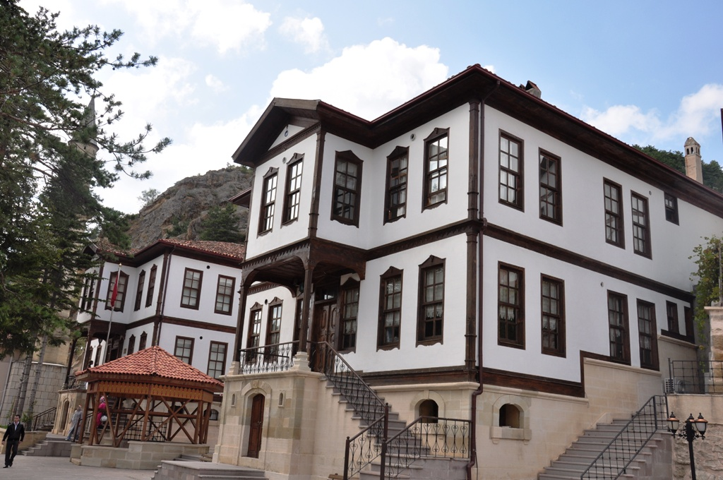 Kastamonu Şeyh Şaban-ı Veli ...